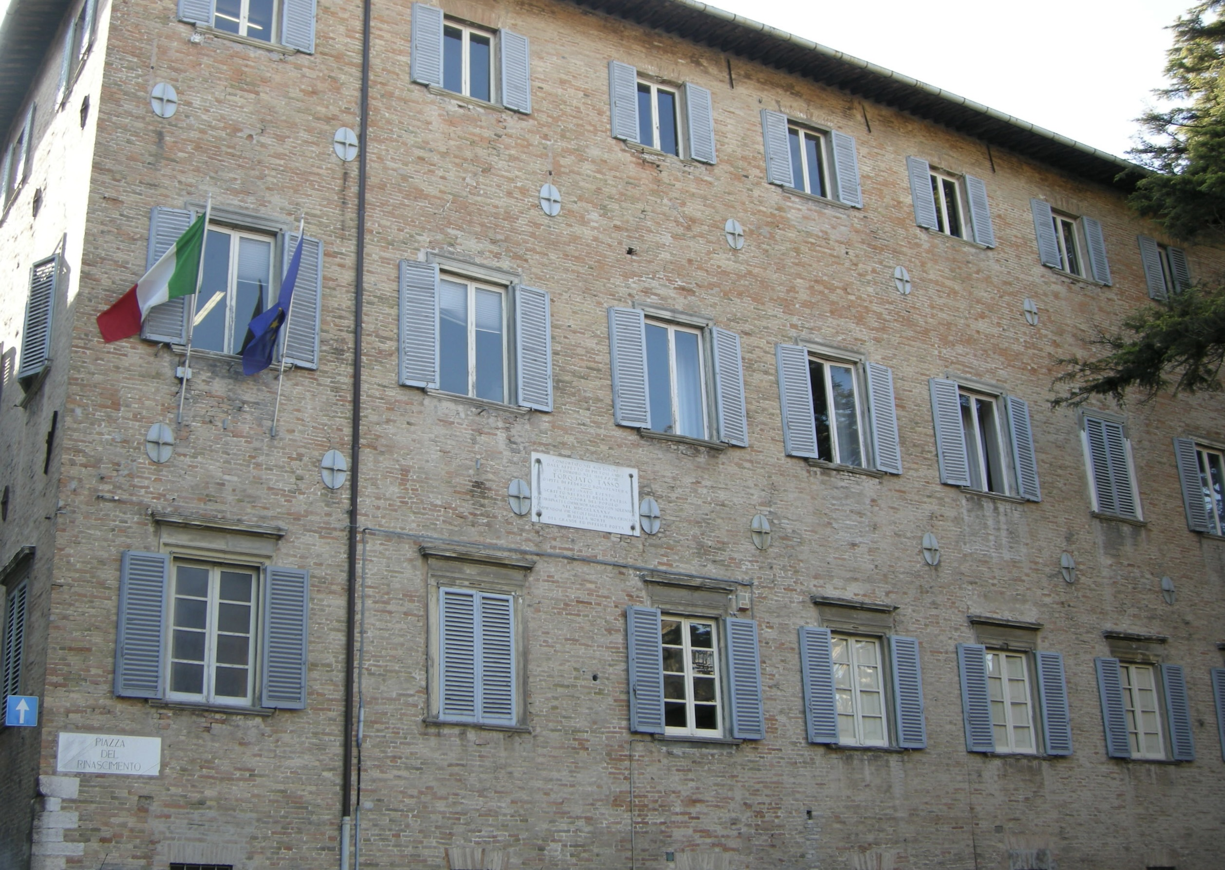 Urbino, piazza rinascimento 3